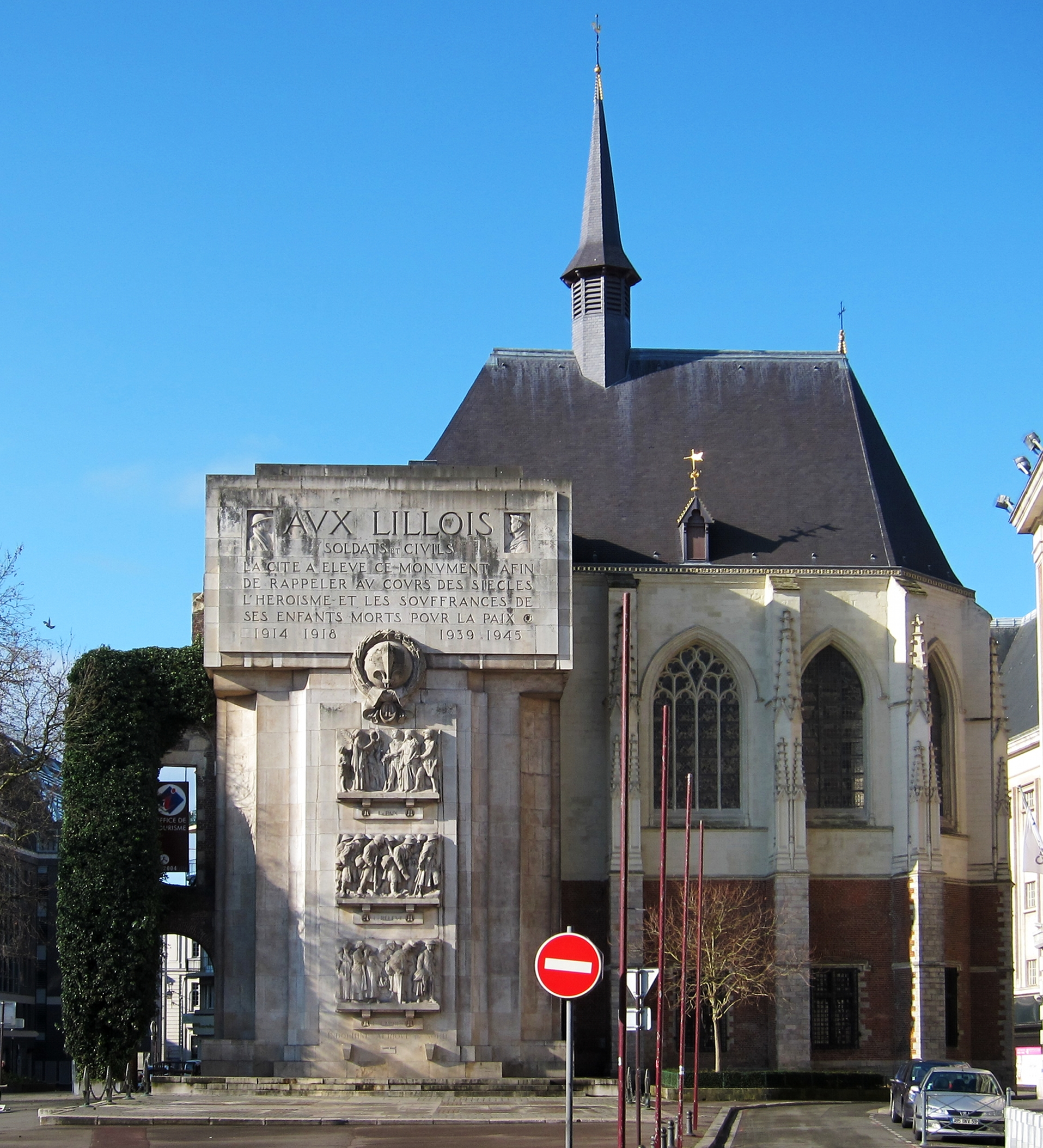 Le Palais Rihour et le Monument aux Morts à Lille.(Le Monument est dû, à l'architecte Jacques Alleman ; au sculpteur Edgar-Henri Boutry).